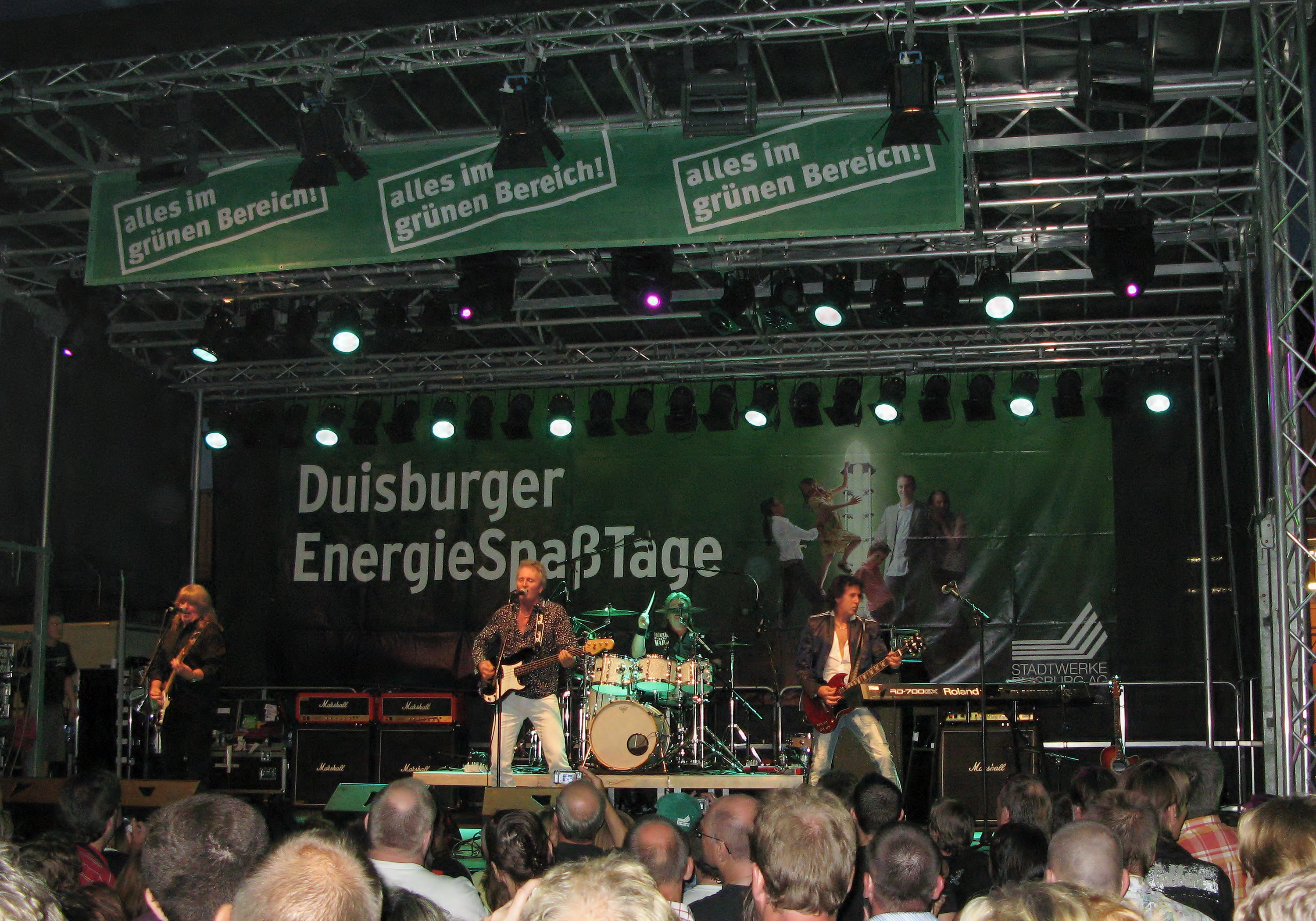 The Sweet in aktueller Besetzung (2009) in Duisburg